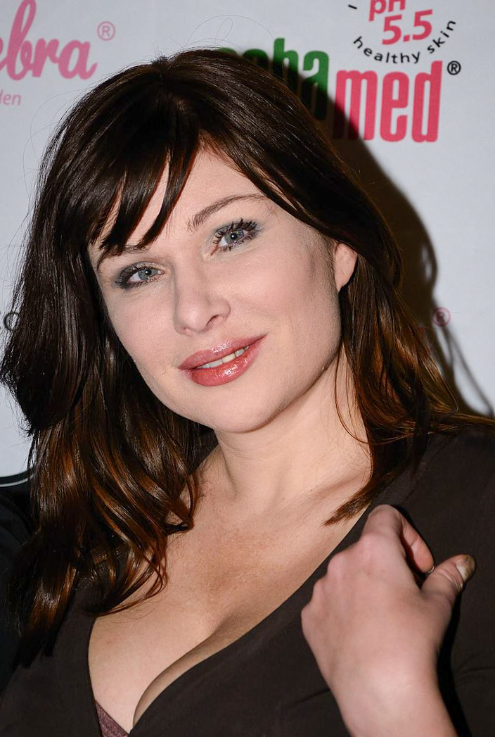 User:Janwikifoto/template pic-bloggers på utdelningen av Finest Awards 2011